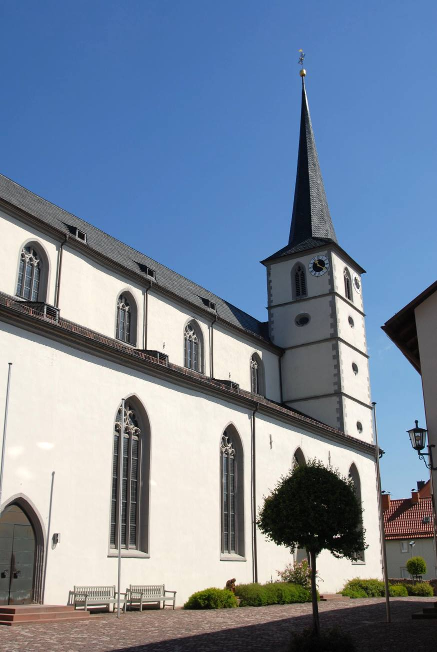 Bischofsheim, Stadtkirche St.Georgius" / city-church